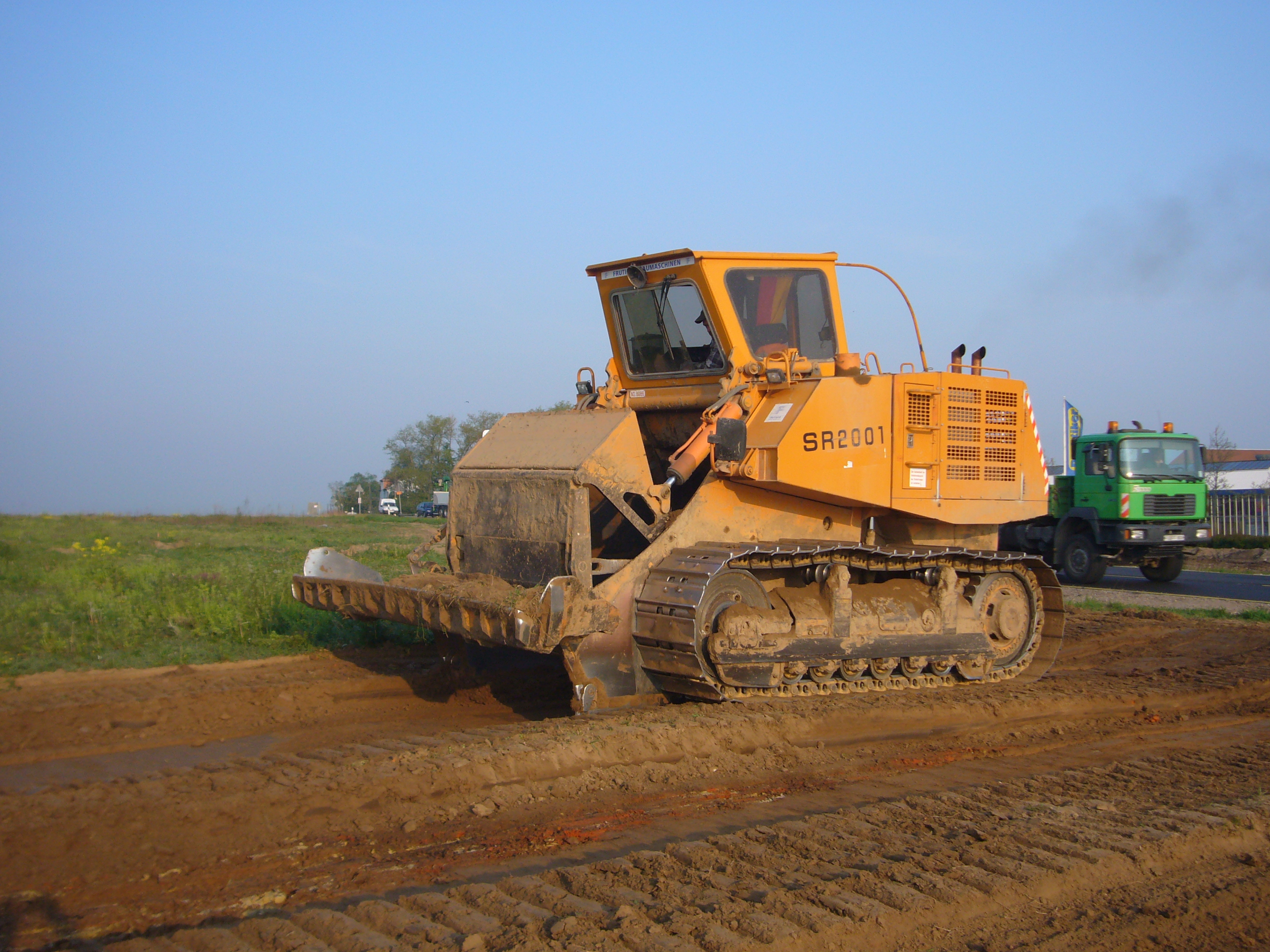 Schürfraupe